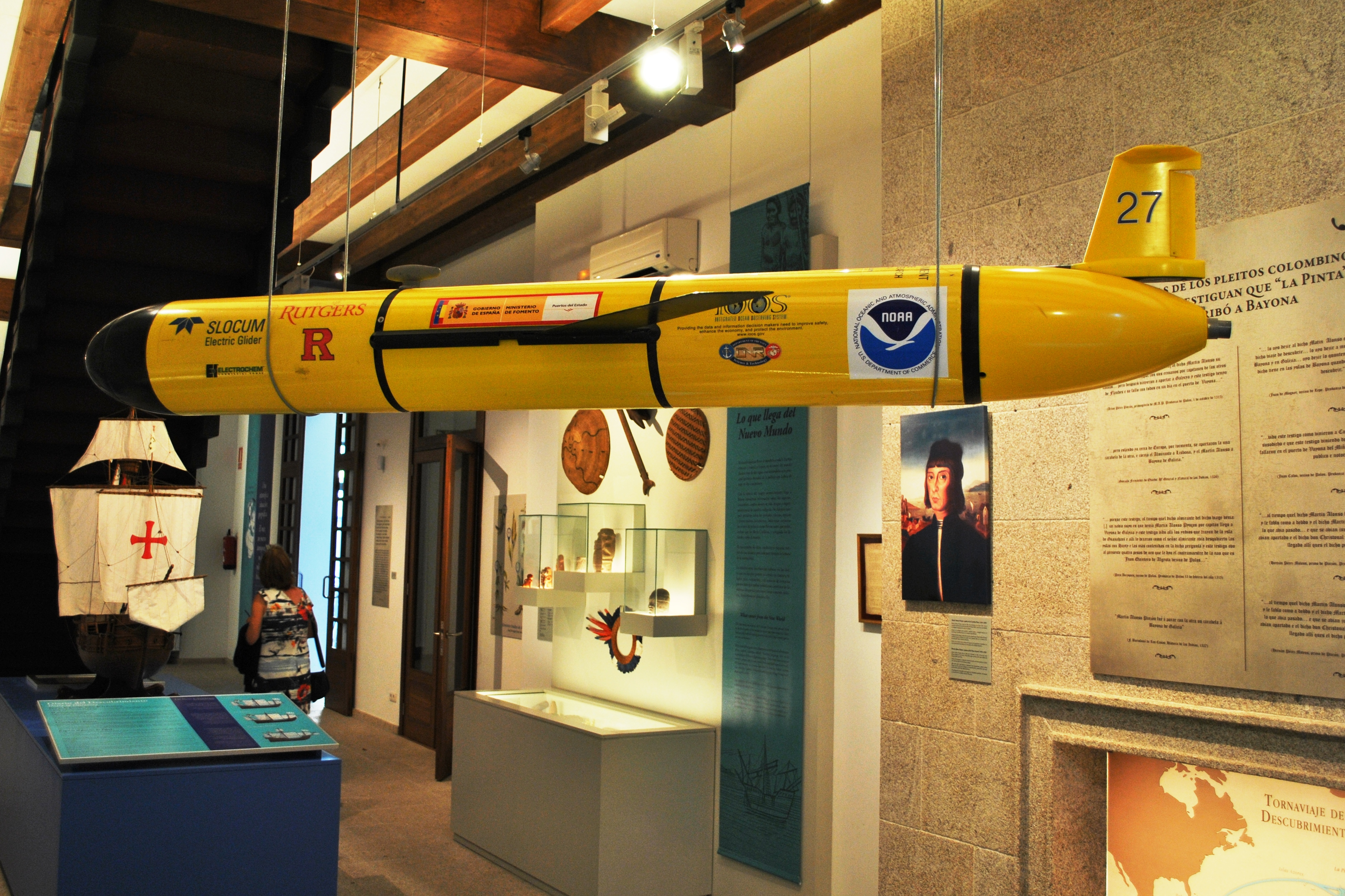 Véxase o título e as categorías